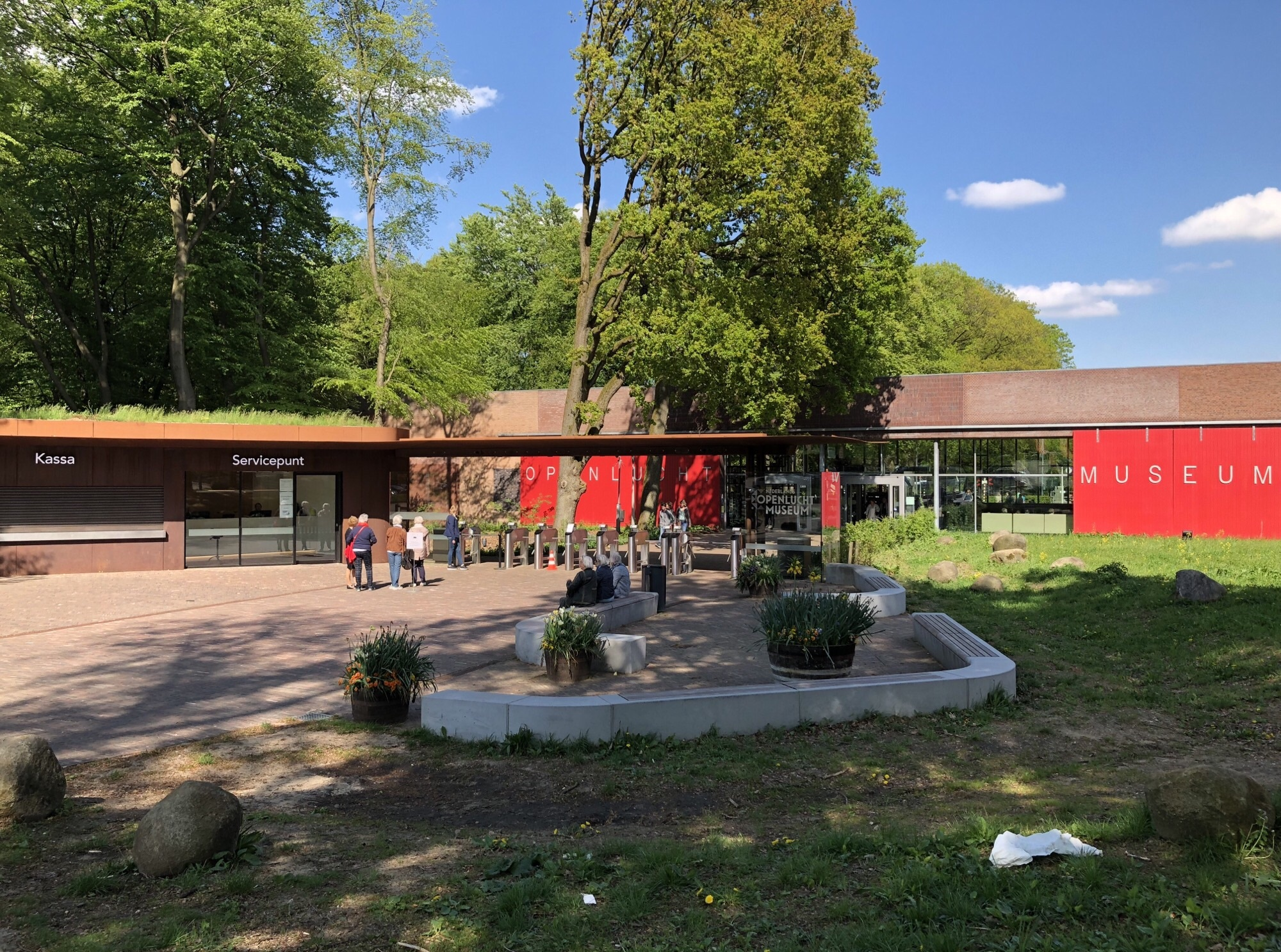 Vernieuwde entree Nederlands Openluchtmuseum